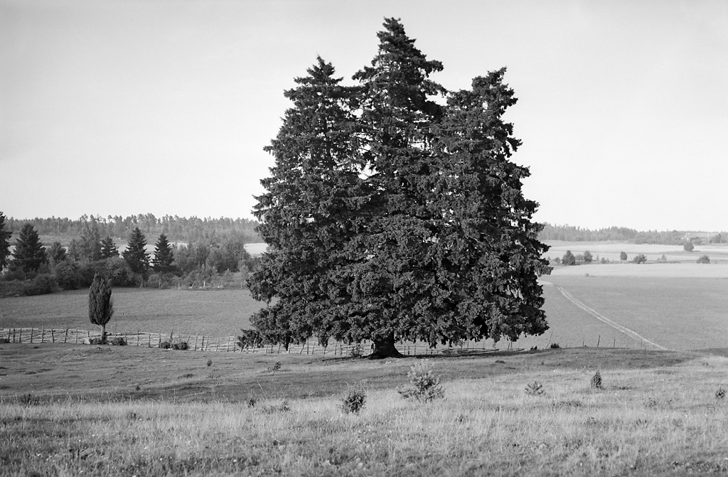 Spruce fir with three trunks at Åsa prehistoric burial ground at Selaön island in Lake Mälaren Trestammad gran på Åsa gravfält på Selaön i Mälaren. Parish (socken): Ytterselö Province (landskap): Södermanland Municipality (kommun): Strängnäs County (län): Södermanland Photograph by: Mårten Sjöbeck Date: 1939 Format: Film Persistent URL: Read more about the photo database (in english)